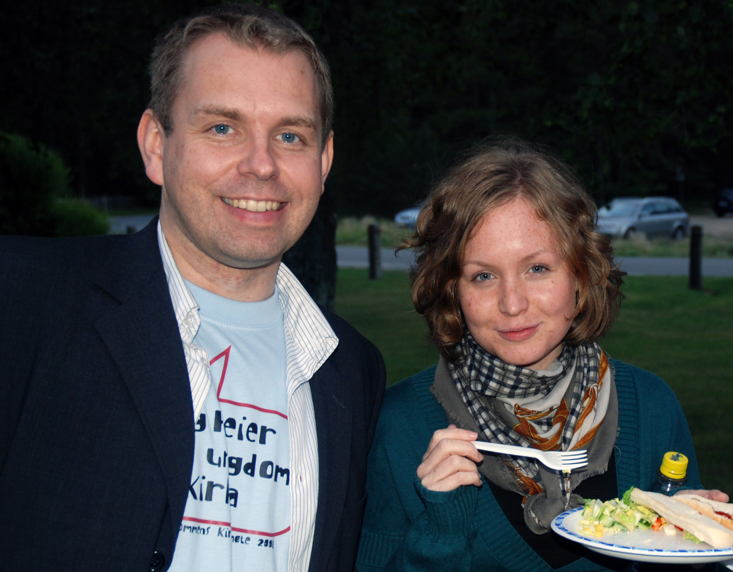 Fra Ungdommens kirkemøte 2008: Statssekretær Halvard Ingebrigtsen på grilling Sankthansaften sammen med Jenny Skumsnes Moe fra Mellomkirkelig råd og Utvalg for ungdomsspørsmål.